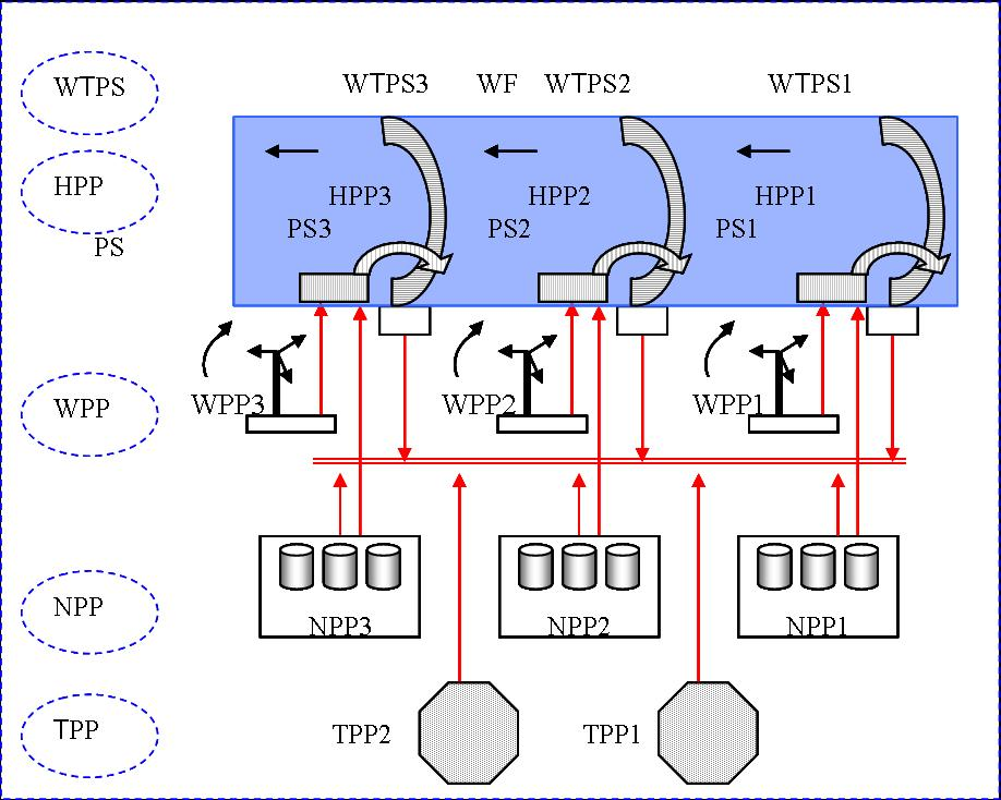 Оптимізація потужності об'єднаної енергосистеми за допомоги . вітротубінних гідроакумулювальних електростанцій